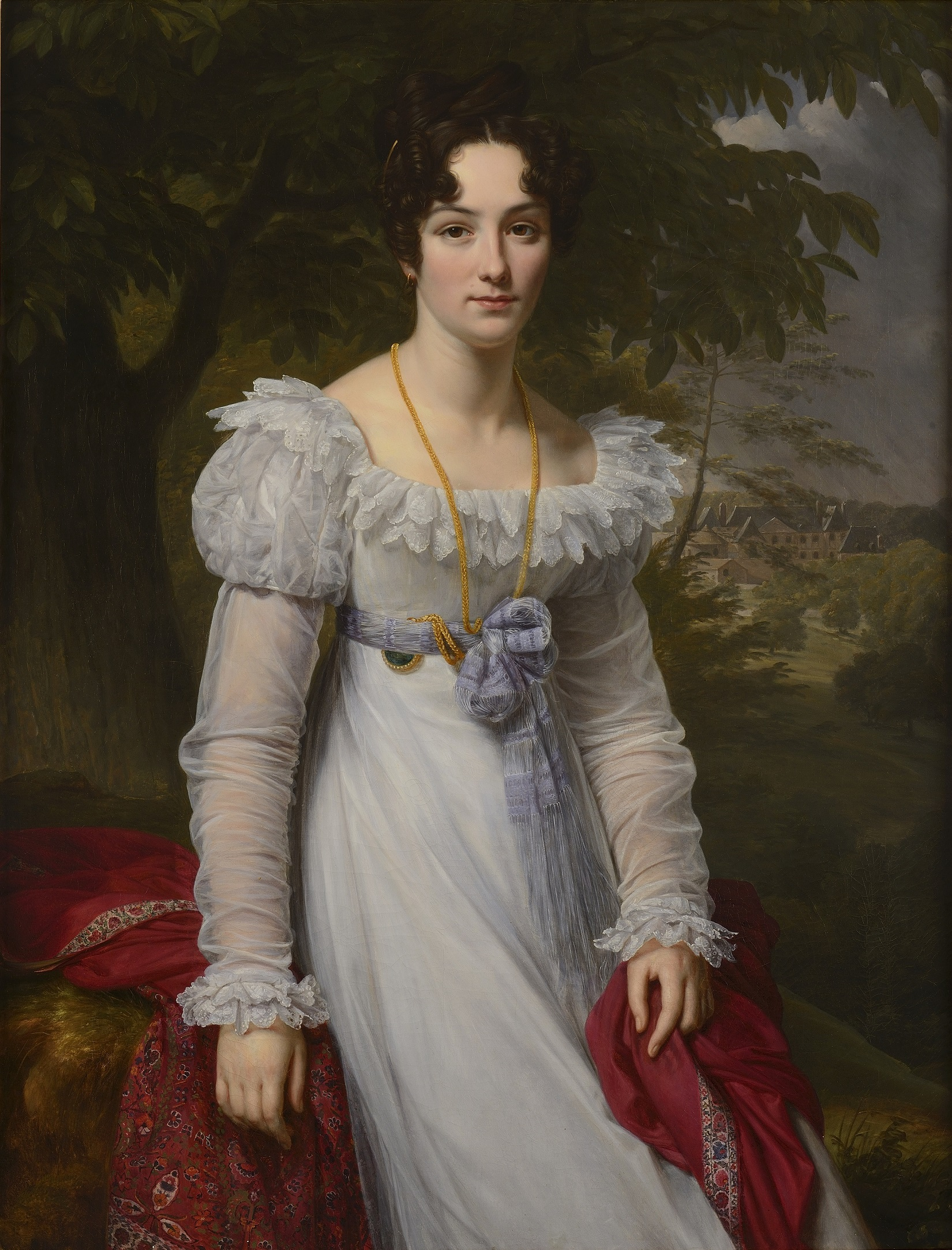 Jenny Hoche, Countess Des Roys (1796-1867)